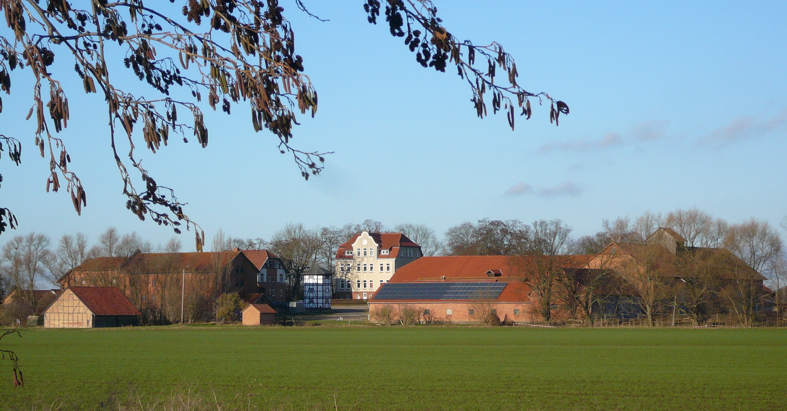 Versuchsgut Reinshof, Gemeinde Friedland, Südniedersachsen. Ehemaliges Klostervorwerk des Augustinerinnenklosters Weende. Ansicht von Südosten mit Taubenturm (19. Jh.) und Wohnhaus in Bildmitte